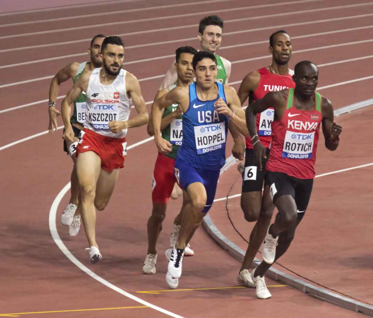 DOH20044 800m men heats kszczot hoppel rotich